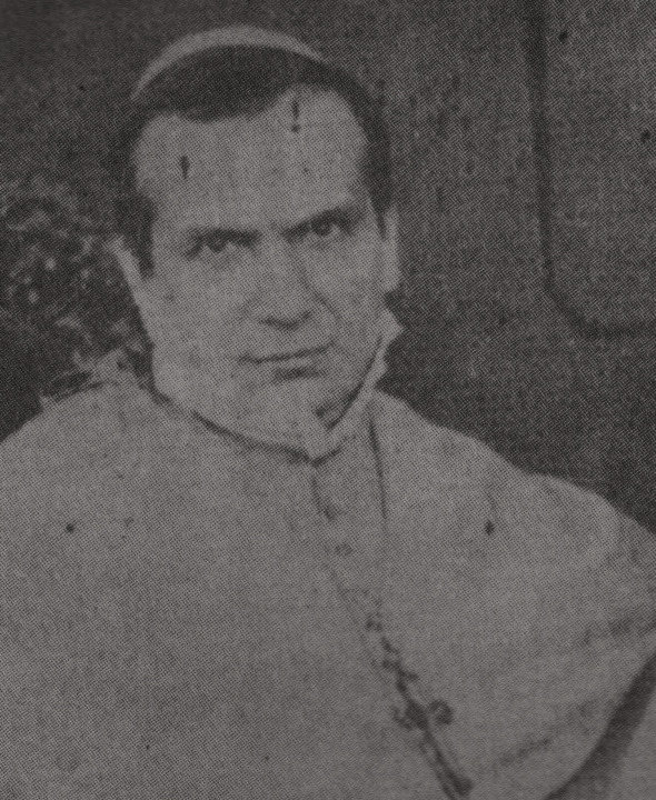 José de Jesús María Uriarte y Pérez, décimo obispo de Sonora y primer obispo de Sinaloa.